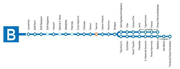 Mappa Linea B, metropolitana di Roma